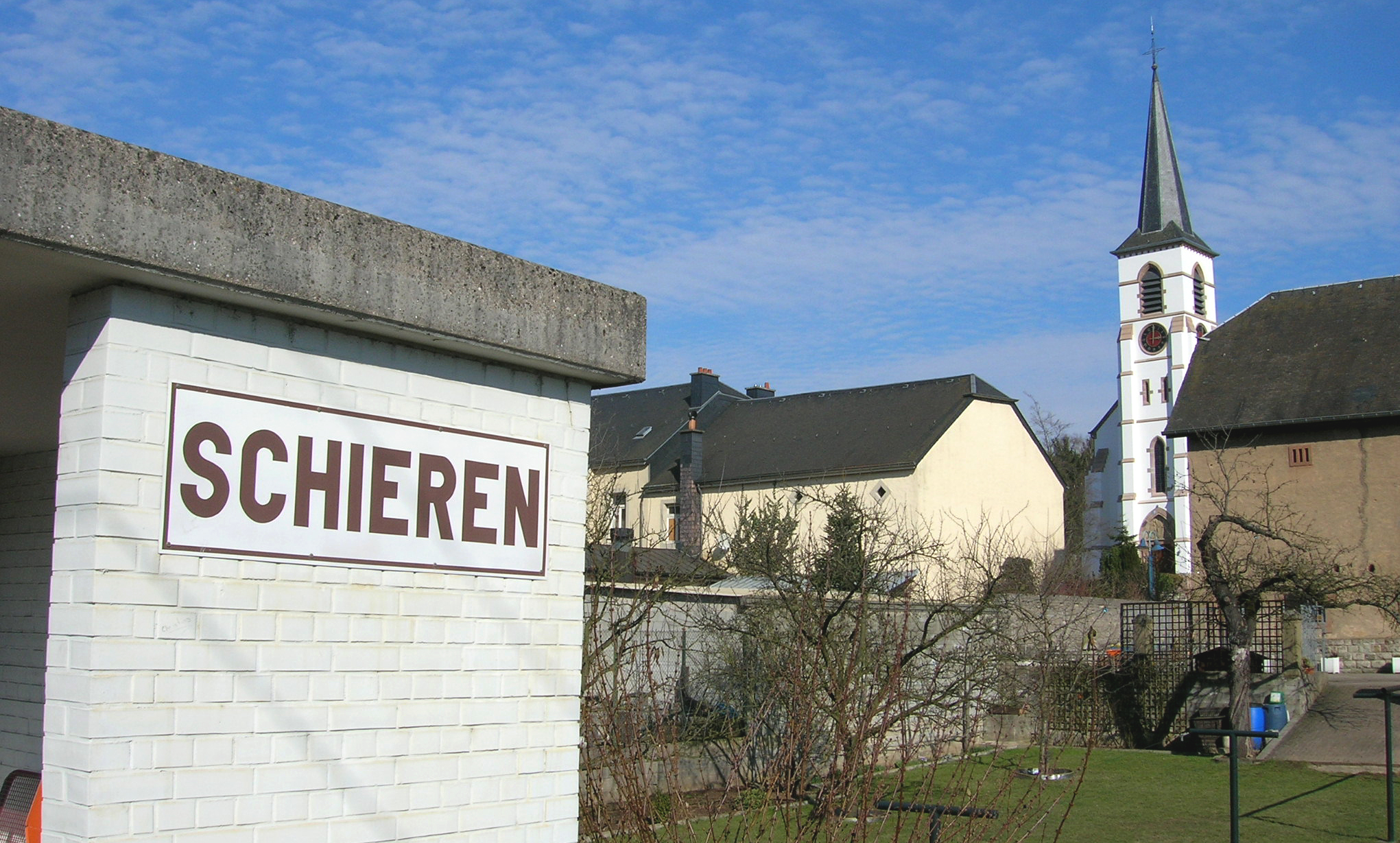 D'Gare an d'Kierch vu Schieren